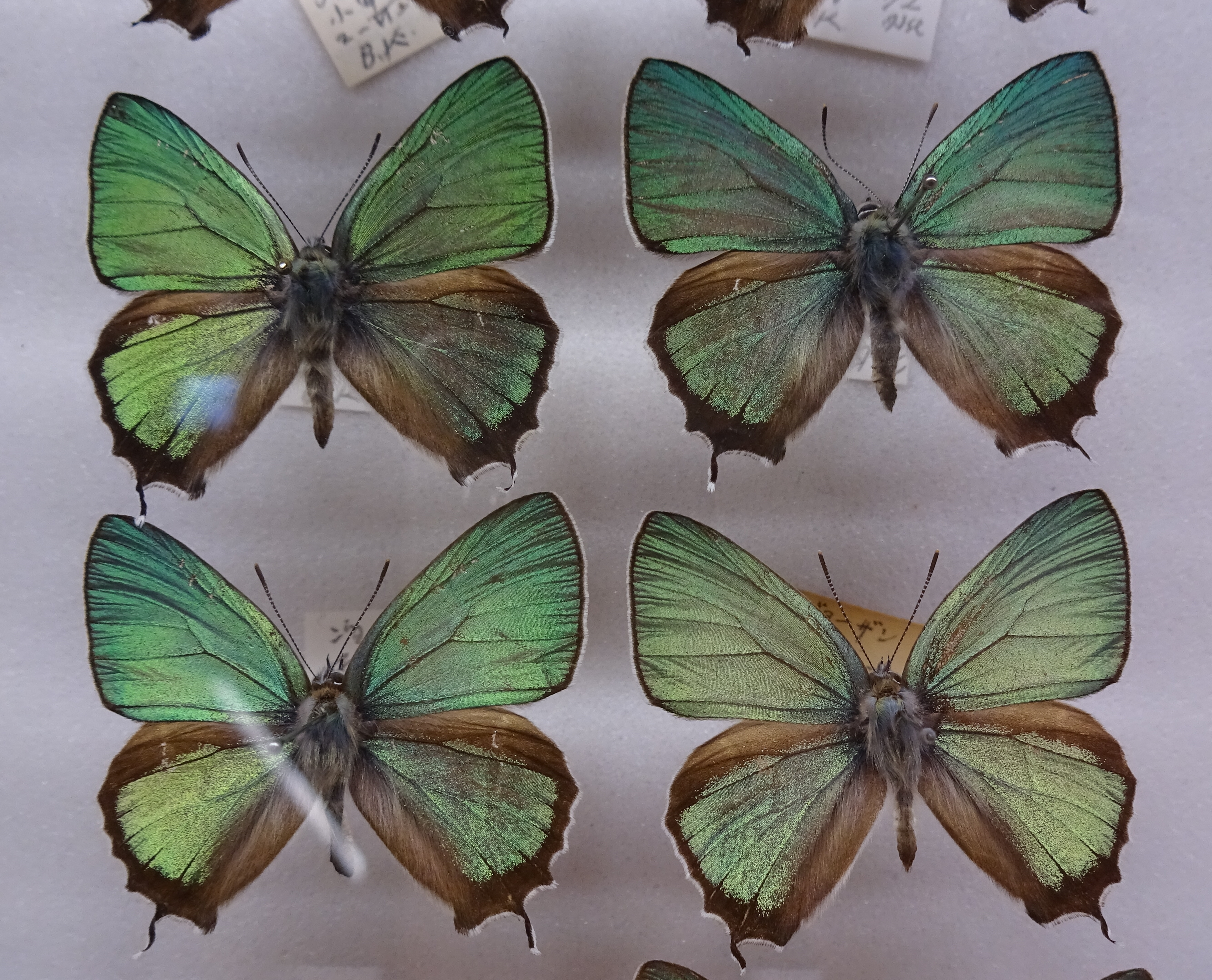 ジョウザンミドリシジミ